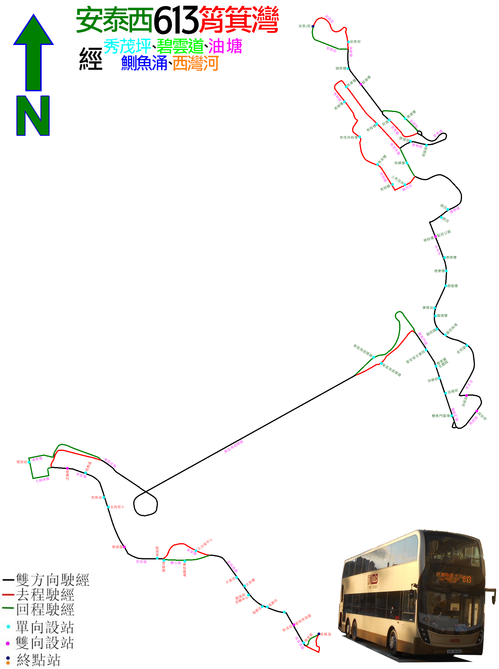 中文（香港）: 過海隧巴613線的走線圖